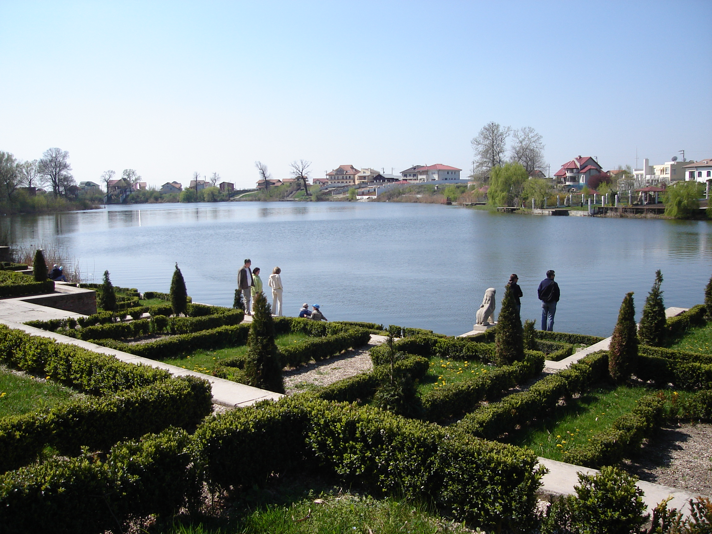 Parcul, lacul, grădină istorică, livadă (36,4 ha) 08